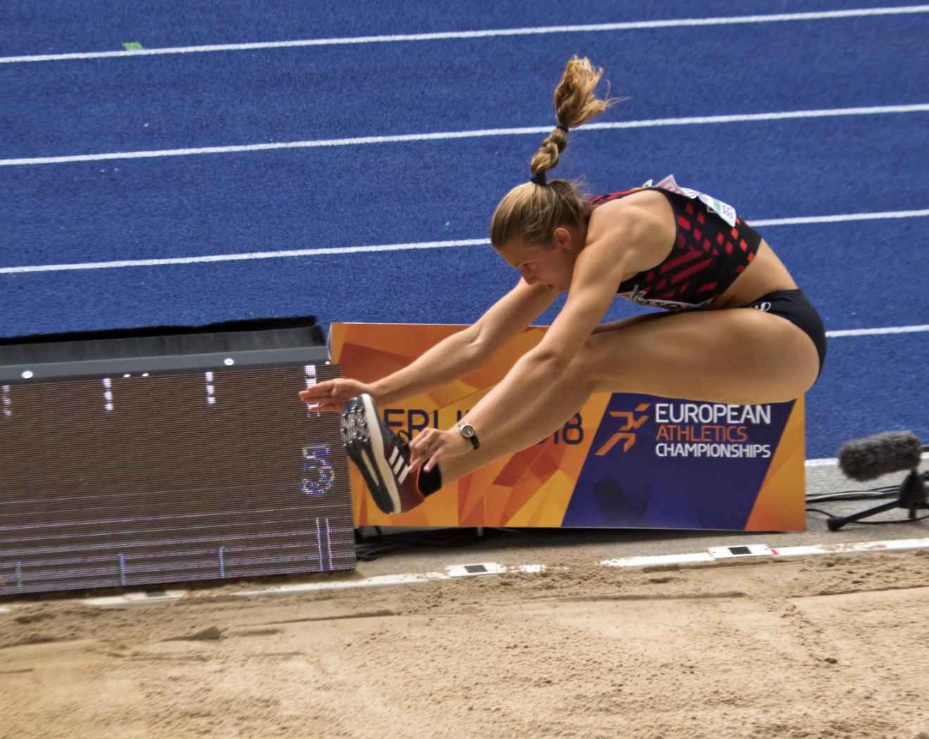 EKB42045 ver maudens